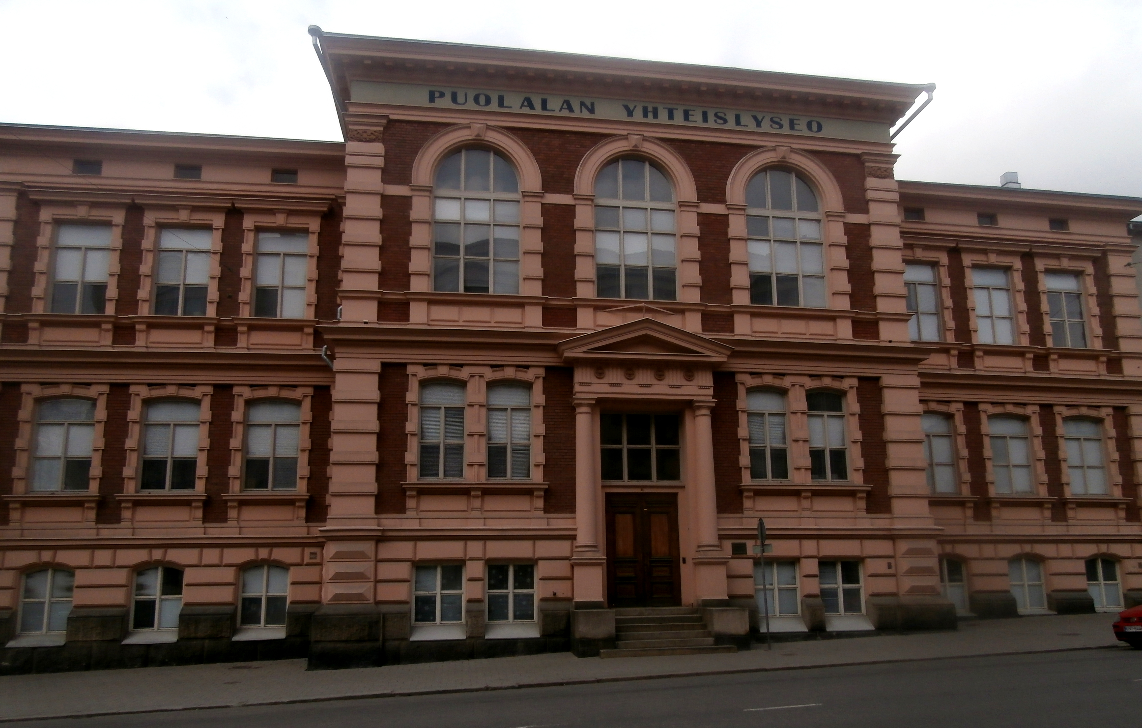 Puolalan yhteislyseo Turussa.